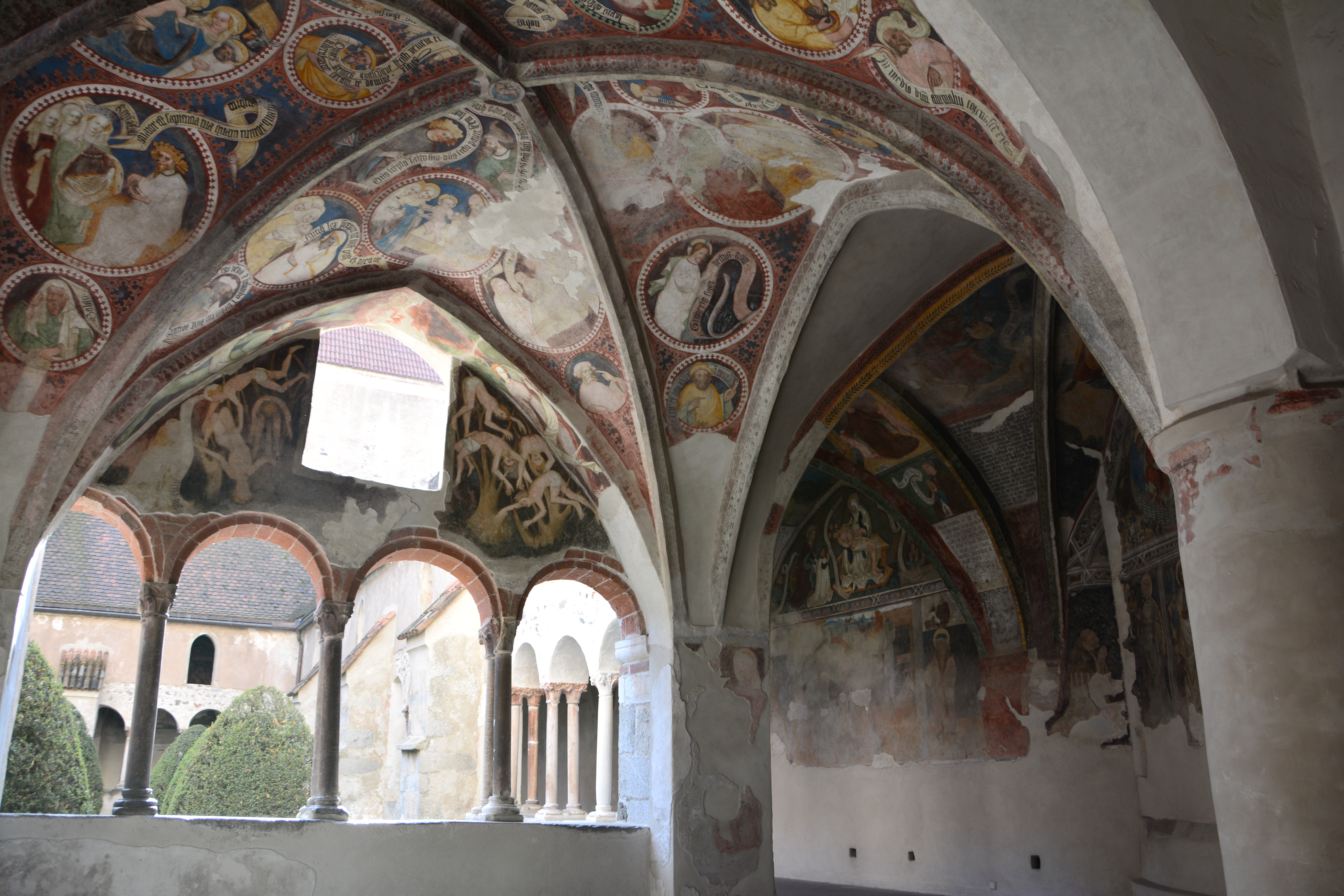 Fresken im Kreuzgang des Brixner Domes, 9. Arkade (Weihnachtsarkade). Unbekannter Meister, um 1400.